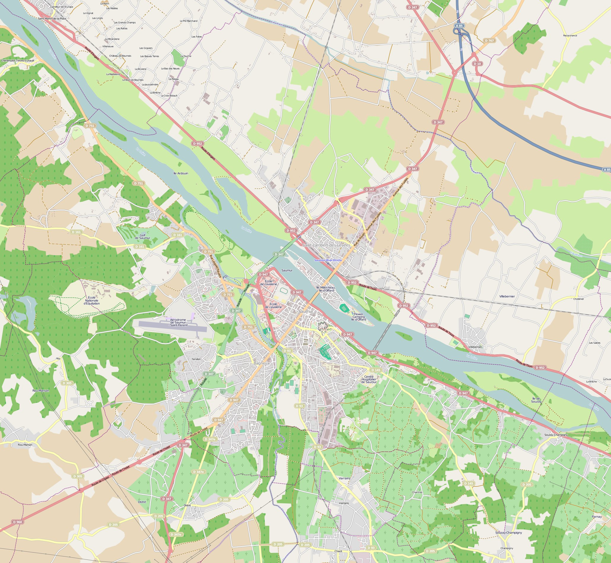 carte de Saumur, France